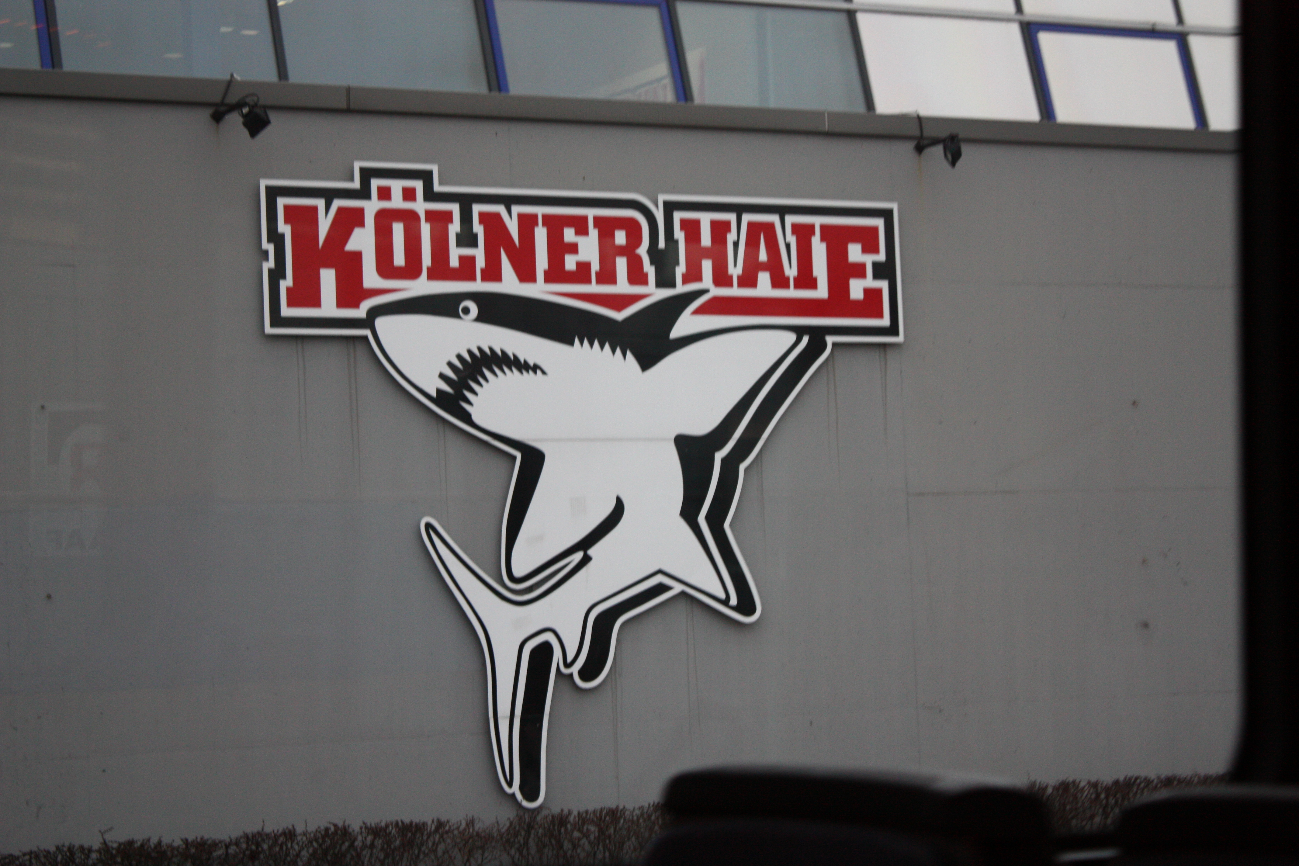 Köln, März 2009